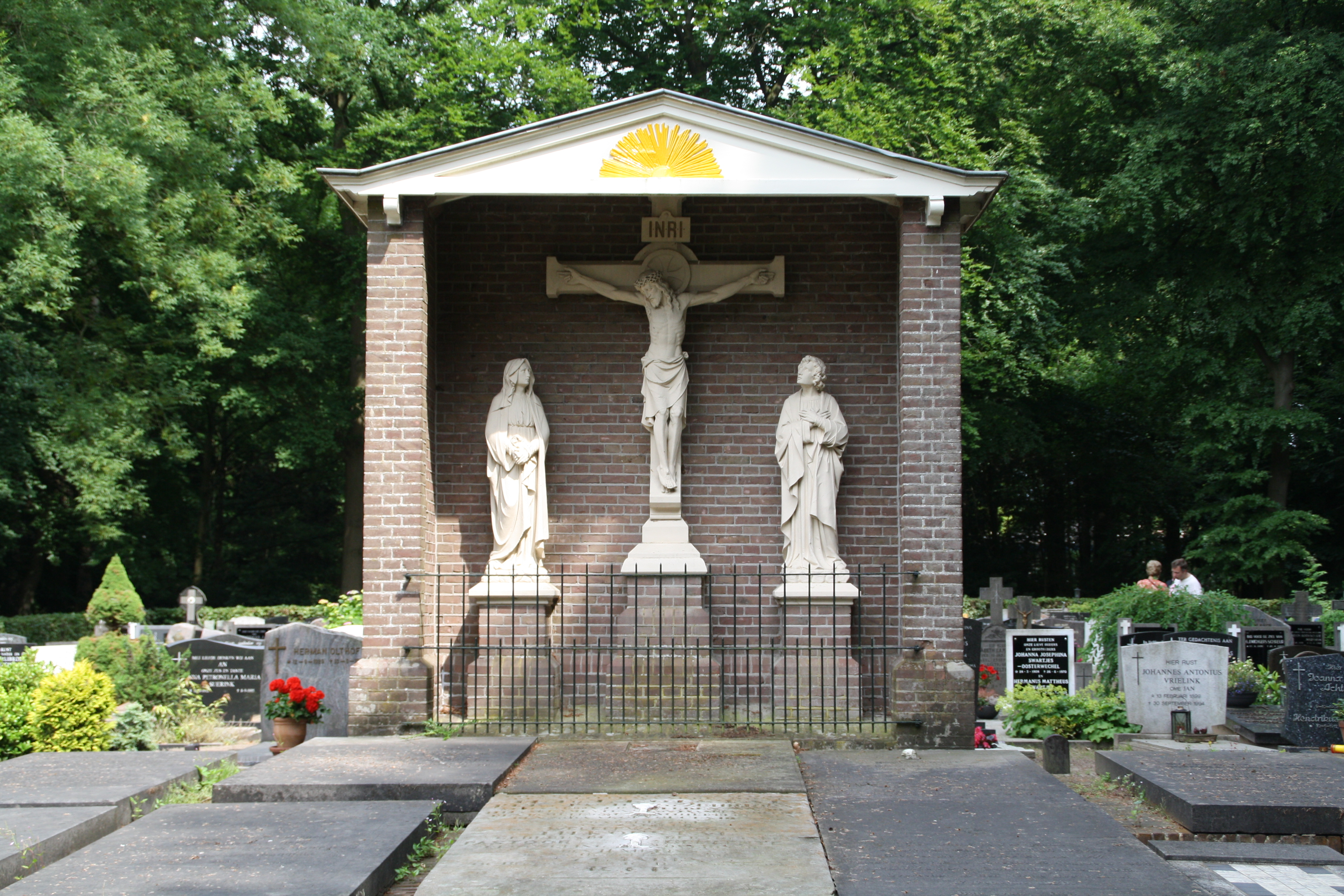 Schalkhaar - Sint-Nicolaaskerk - 2013 - Cavalieberg begraafplaats